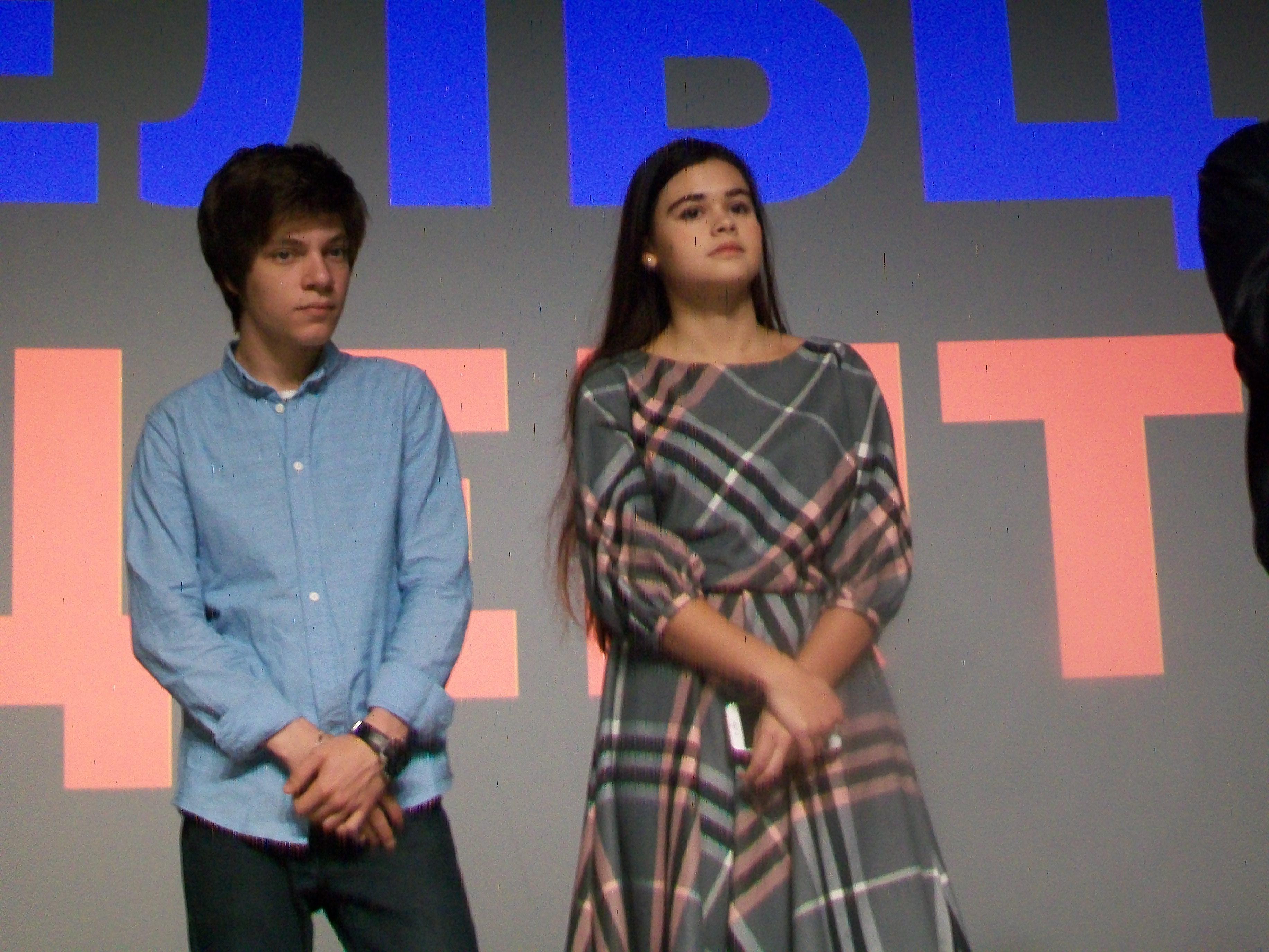 Актеры Егор Клинаев и Анфиса Вистингаузен на презентации фильма Частное пионерское -3. Екатеринбург, Ельцин-центр, сентябрь 2017 года